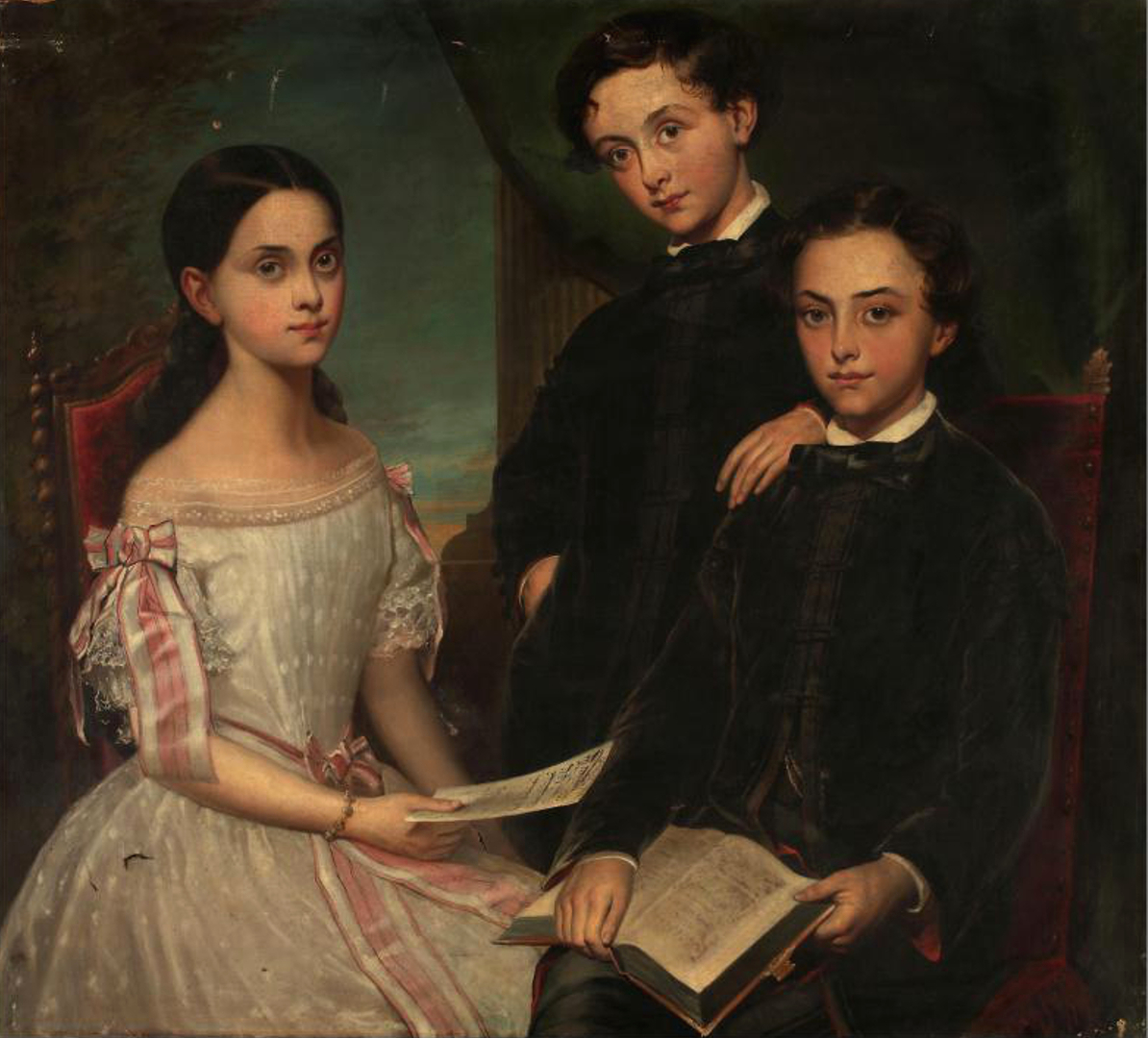 Kossuth Lajos gyermekei: Kossuth Vilma (1843-1862), Kossuth Ferenc (1841-1914) és Kossuth Lajos Tivadar (Tódor) (1844-1918). Az 1850-es években készült festmény alapján